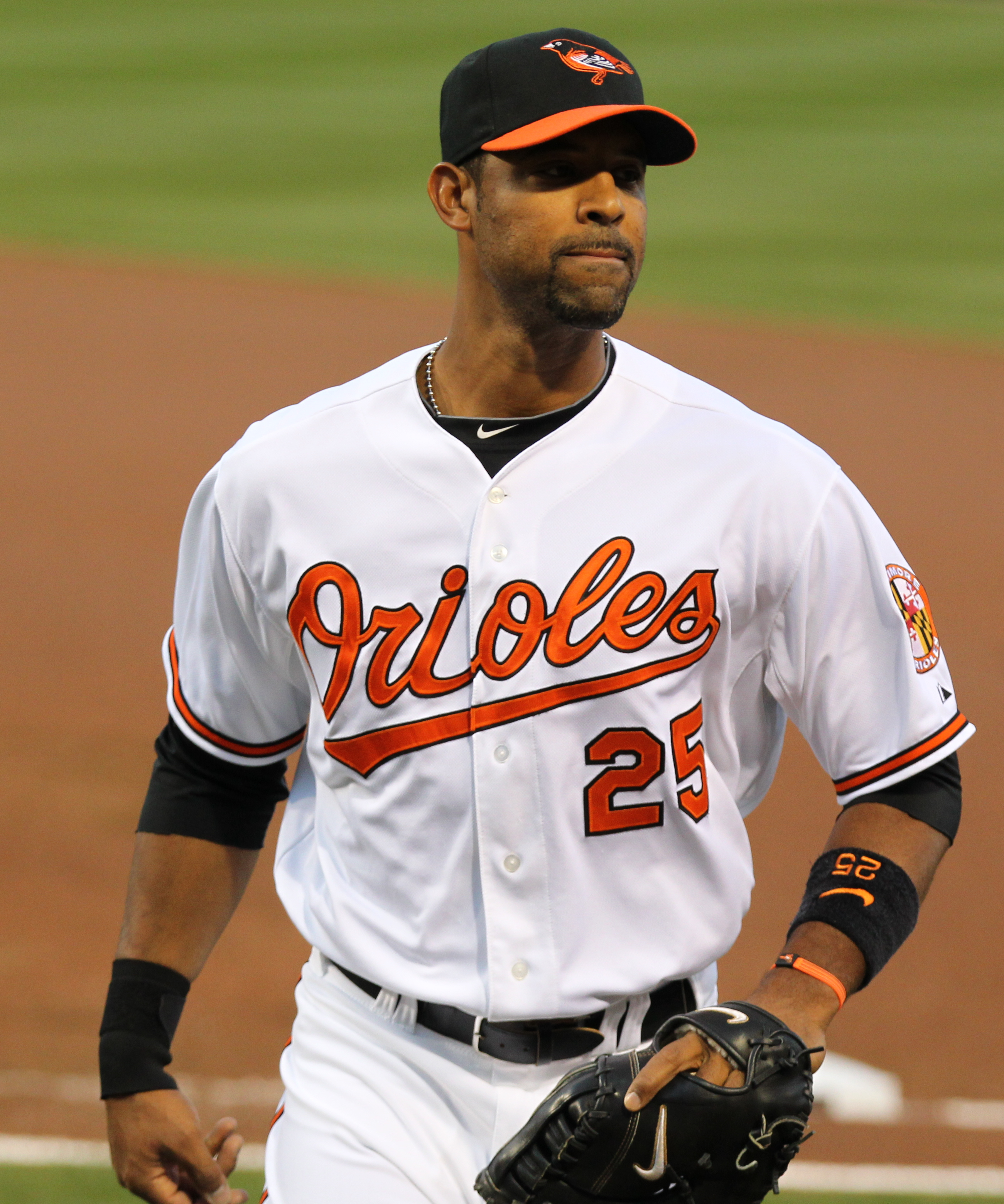 Derrek Lee